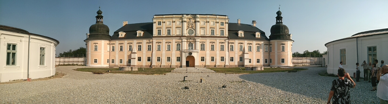 L’Huillier-Coburg-kastély főhomlokzata This is a photo of a monument in Hungary. Identifier: 2726